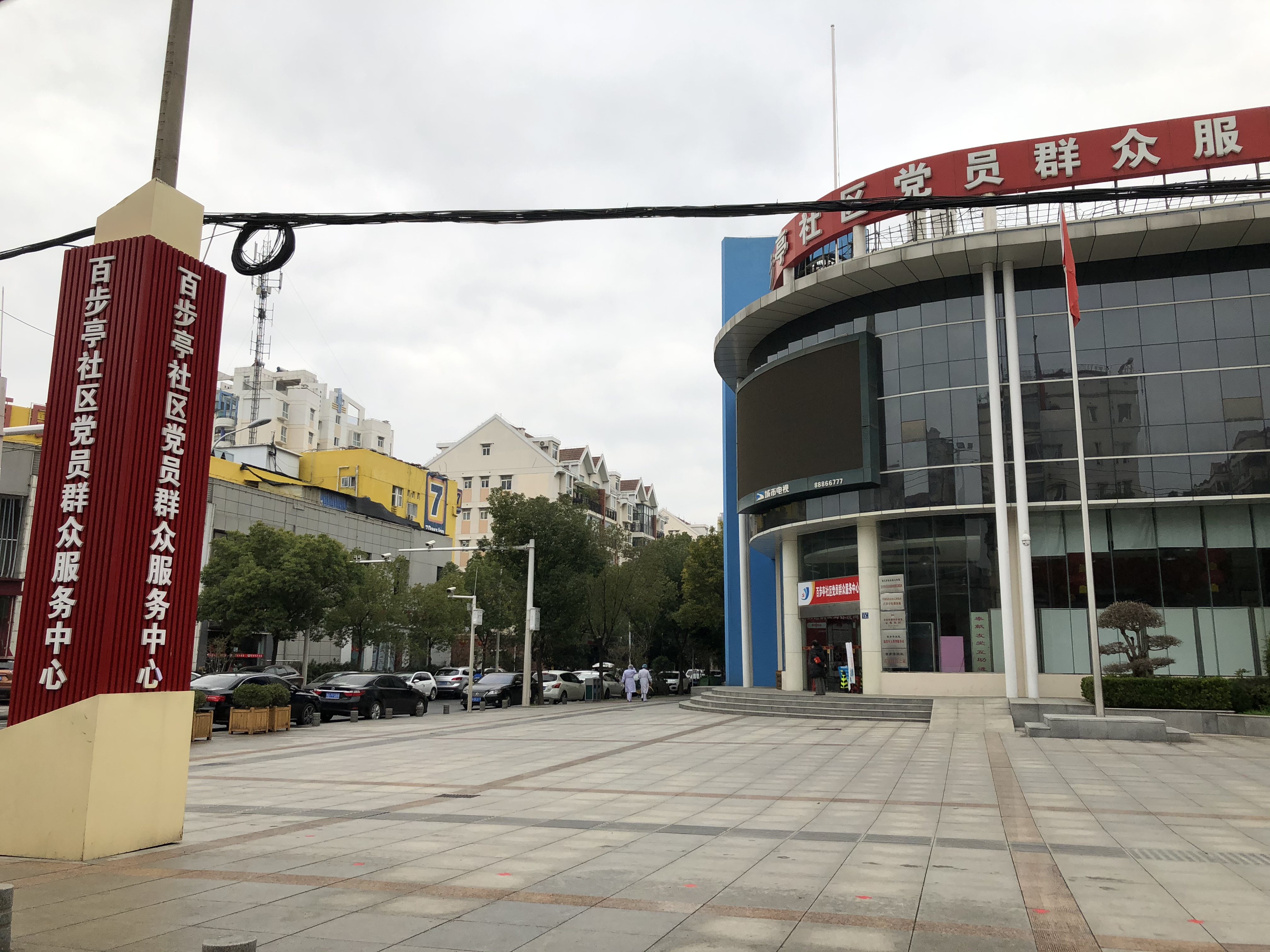 中文（中国大陆）: 百步亭社区